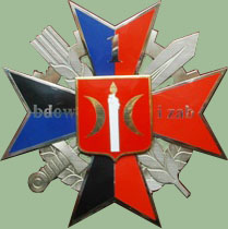 Oznaka pamiątkowa 1 Batalionu Dowodzenia i Zabezpieczenia "Ziemi Świeckiej" w Bydgoszczy